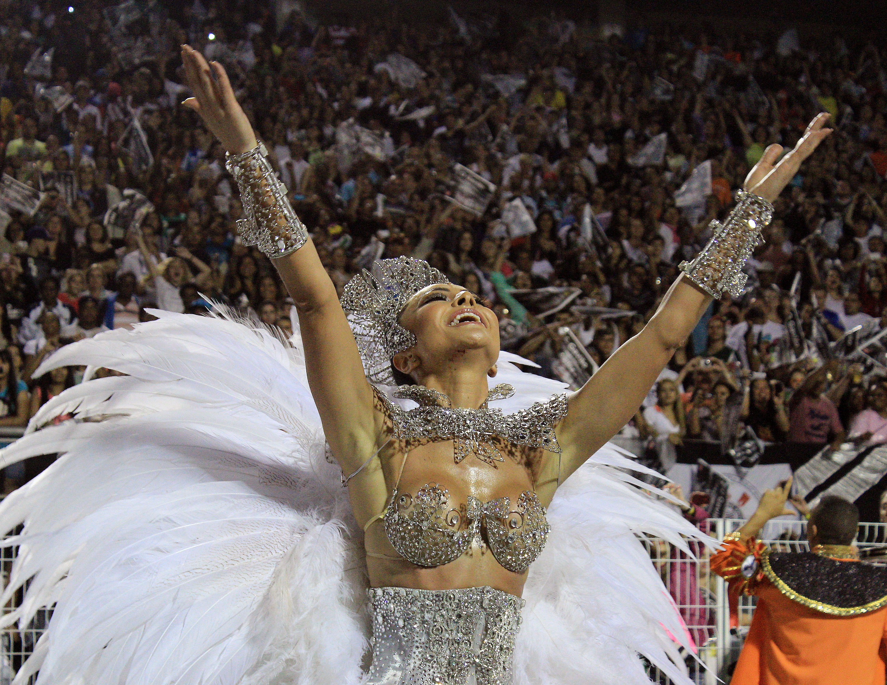 CARNAVAL 2013 - ANHEMBI - SENGUNDO DIA DE DESFILE - Sabrina sato desfila como madrinha da bateria da escola Gaviões da Fiel na noite deste domingo (10). Foto: Jardiel Carvalho/CPN